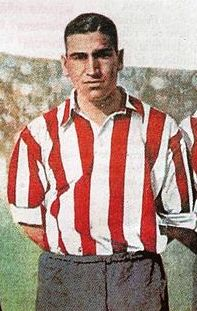 Manuel Ferreira en Estudiantes de La Plata (Imagen recortada de Los Profesores).